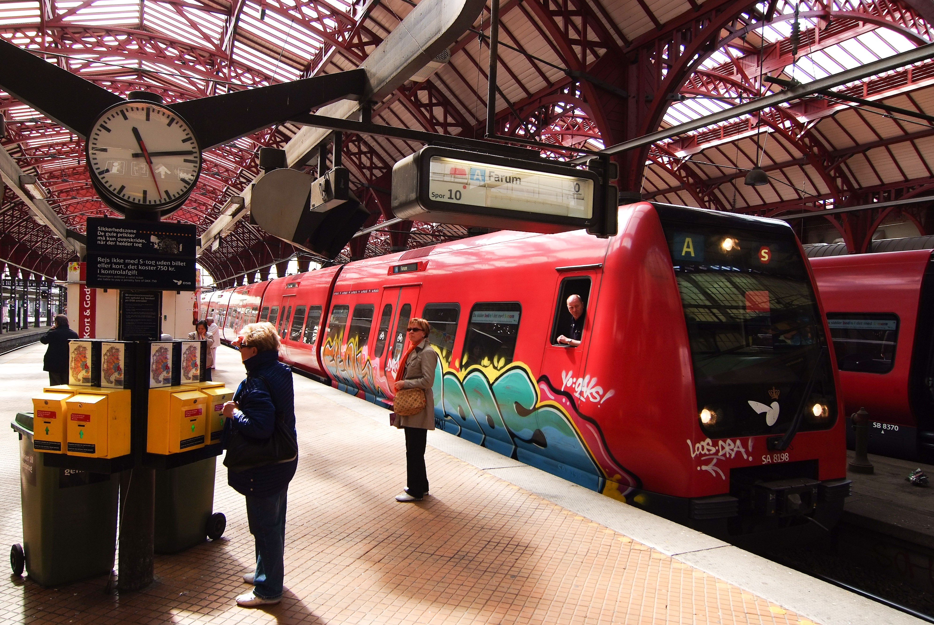 Copenhagen Central Station (Københavns Hovedbanegård)